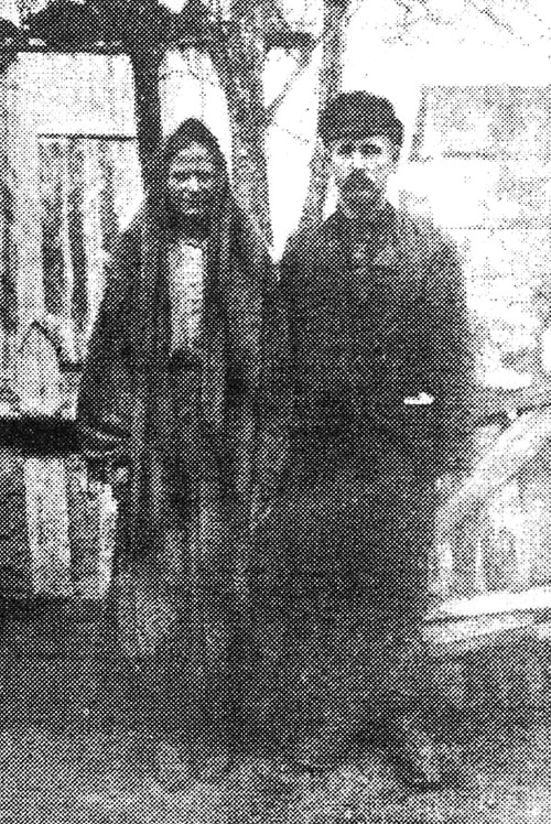 Фонарщик Казимир Шаховской и его жена Ульяна Lamplighter Kzsimir Shakhovsky and his wife, Uliana